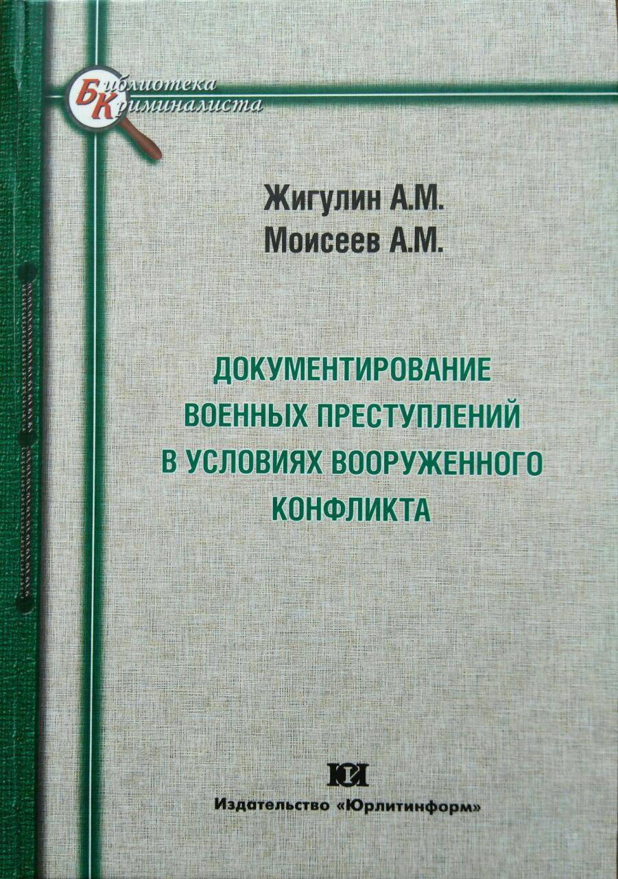 Документирование военных преступлений в условиях вооруженного конфликта: монография. А.М. Жигулин, А. М. Моисеев. Издательство "Юрлитинформ", 2016.